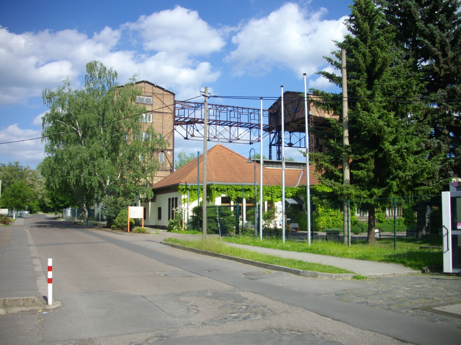 Partie am Schacht Dölitz bei Leipzig